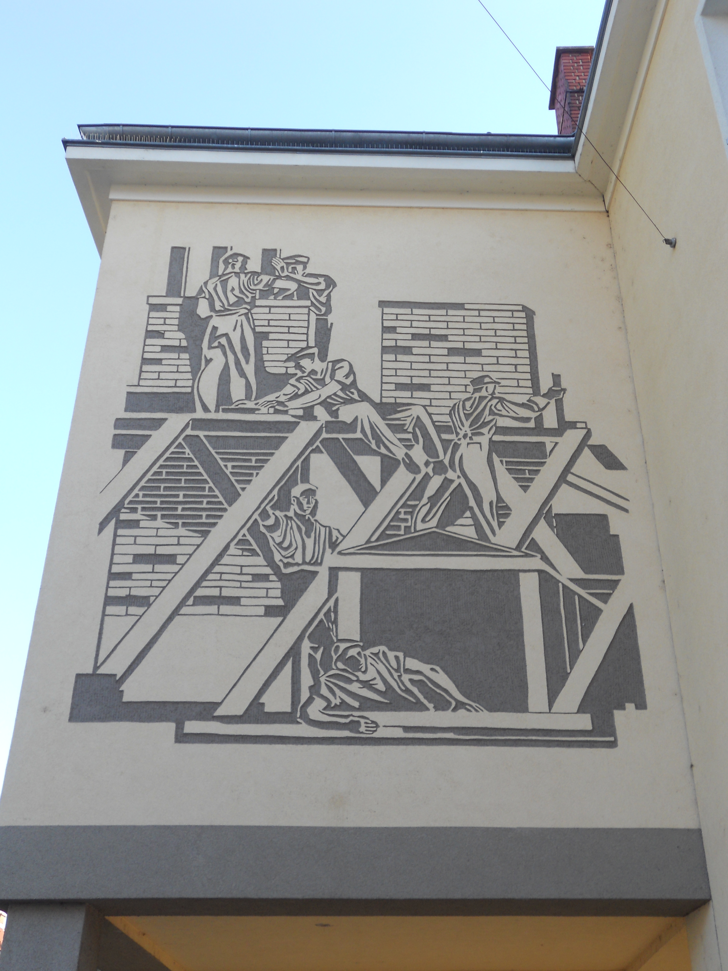 Wohnhausanlage der Gemeinde Wien